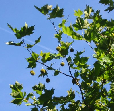 Plataan, bladeren, eigen foto